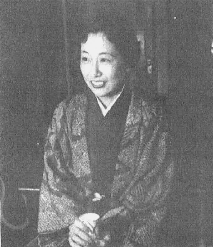 読売新聞社『家庭よみうり』374号（1954年）より和田夏十